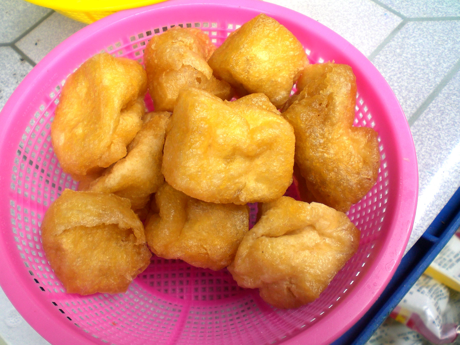 粵語: 旺角街市